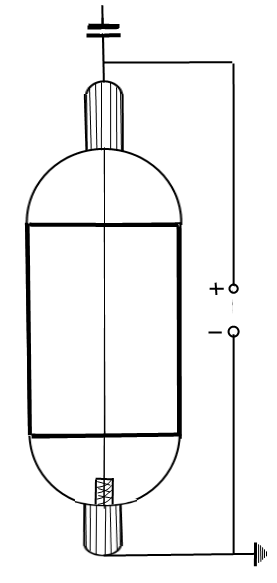 Contor Geiger gamma